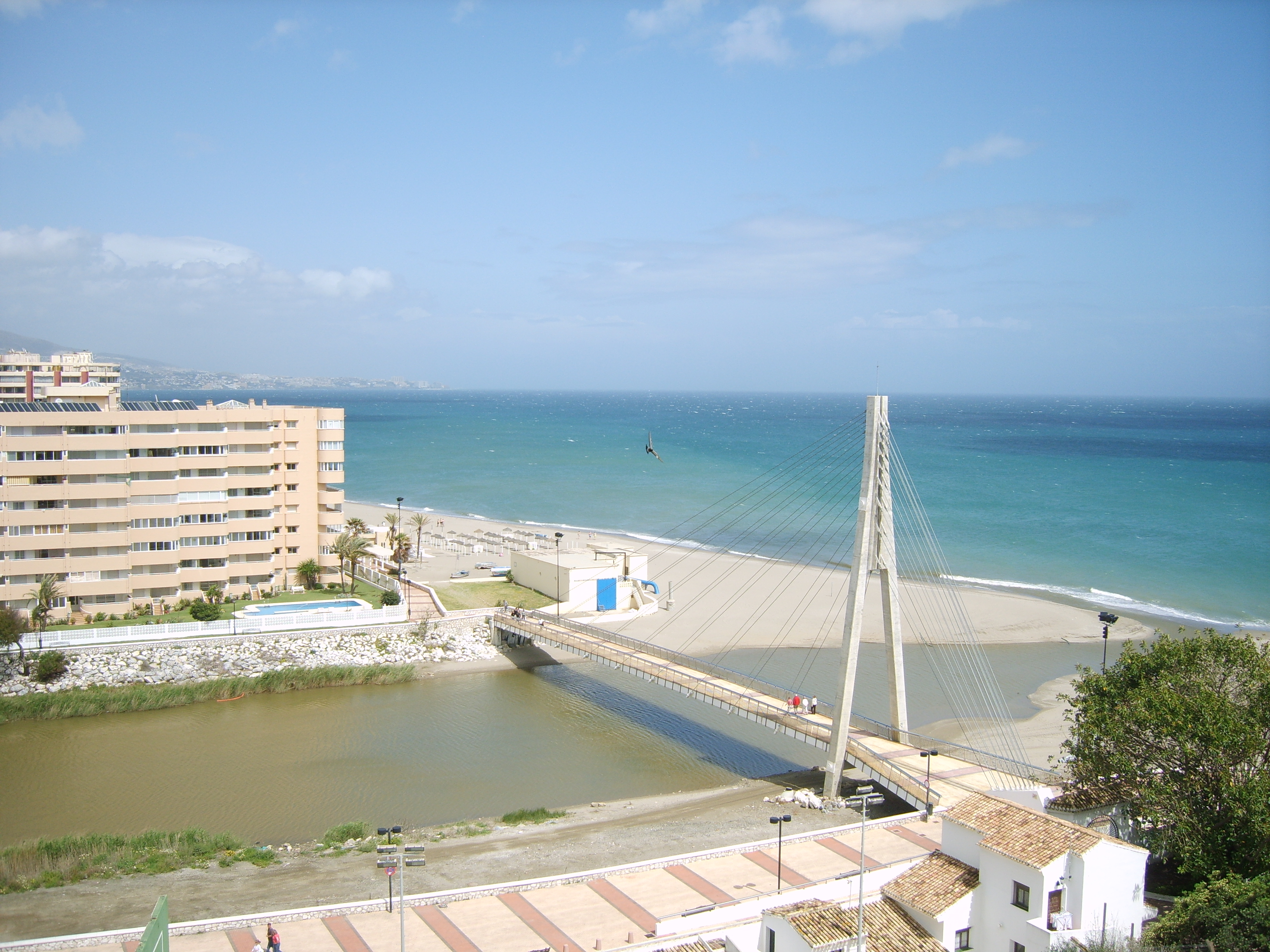 Fuengirola bridge